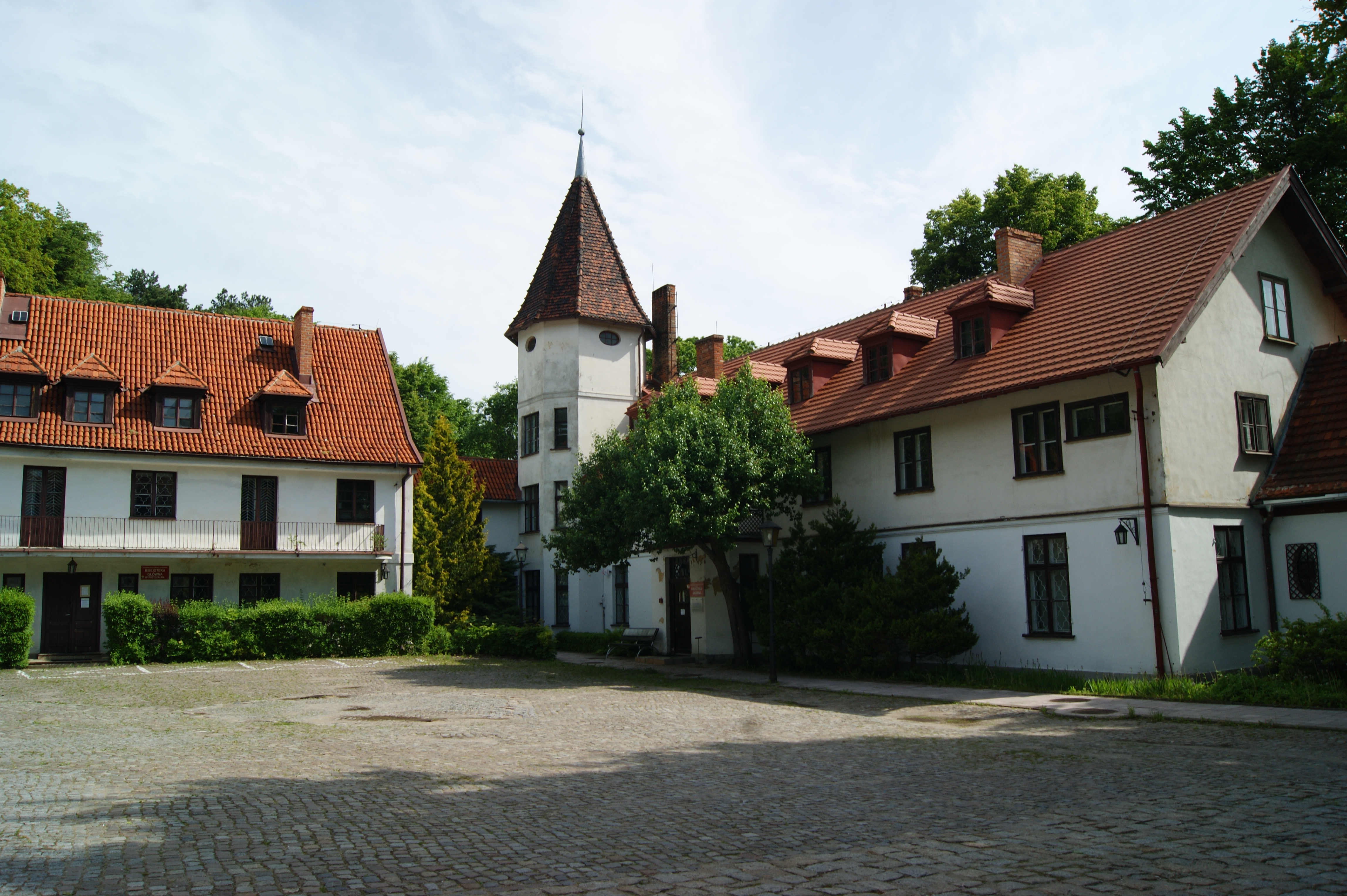 Gdańsk, zespół dworski Ludolphine, XIX, XX